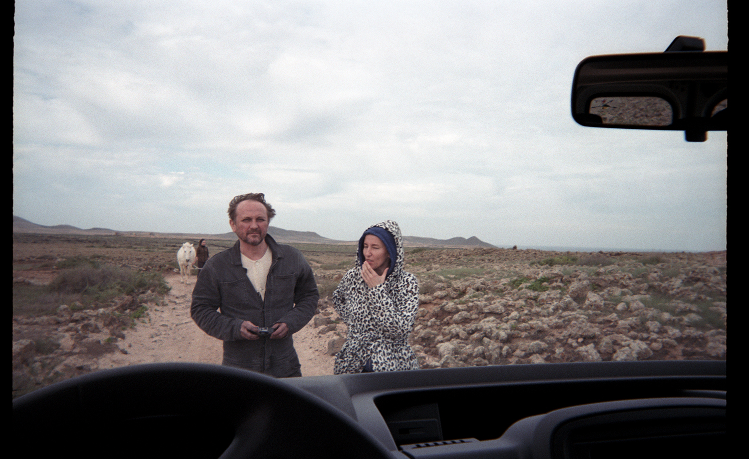 film "Las" by Joanna Zastróżna, film set, Fuerteventura , 2015, work in progress